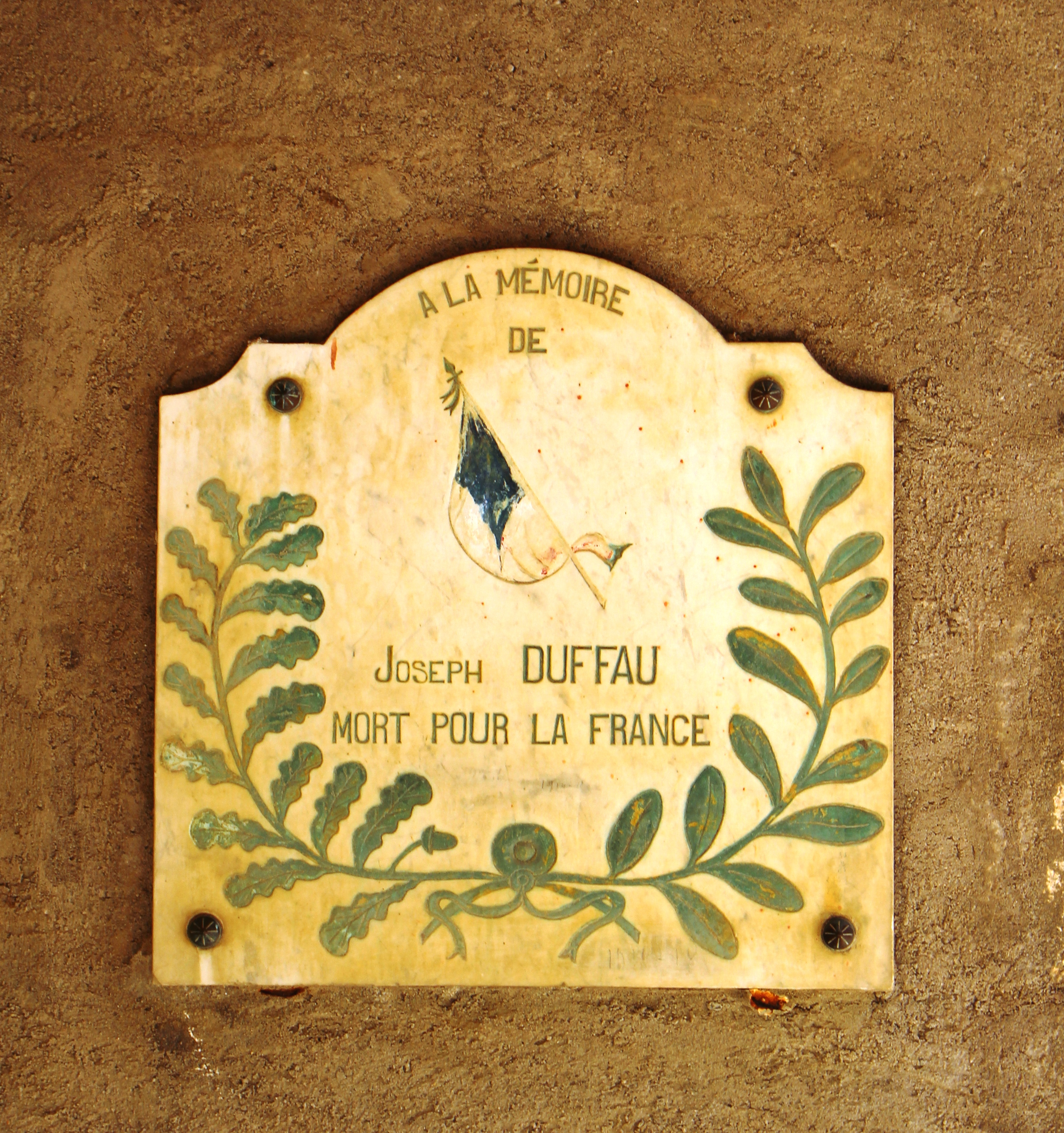 Monument aux morts de Villefranque (Hautes-Pyrénées)